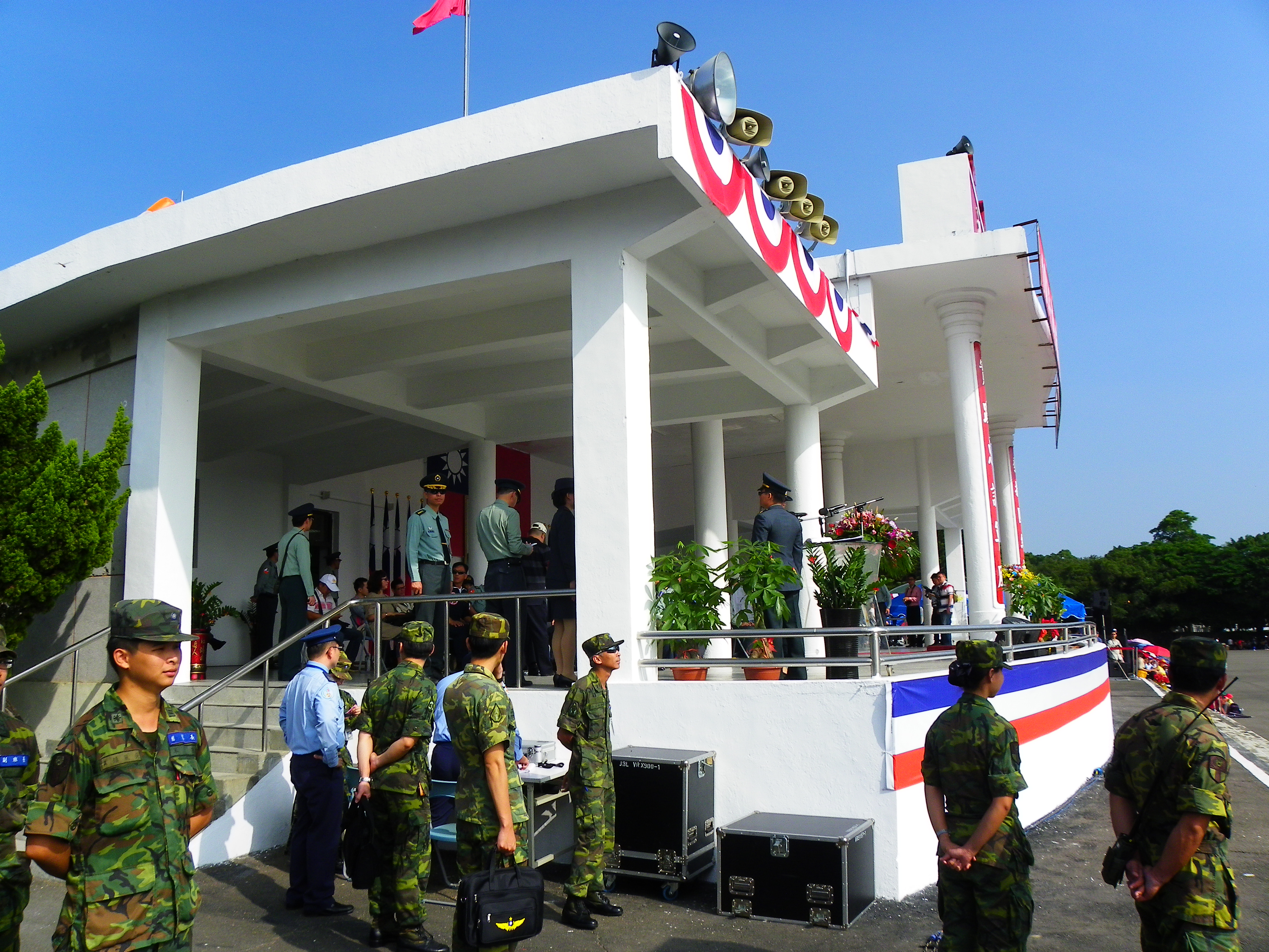 2013年成功嶺營區開放活動，表演節目開始前的介壽臺東南角。